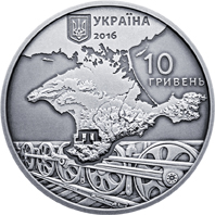 Аверс срібної монети НБУ «Пам'яті жертв геноциду кримськотатарського народу»